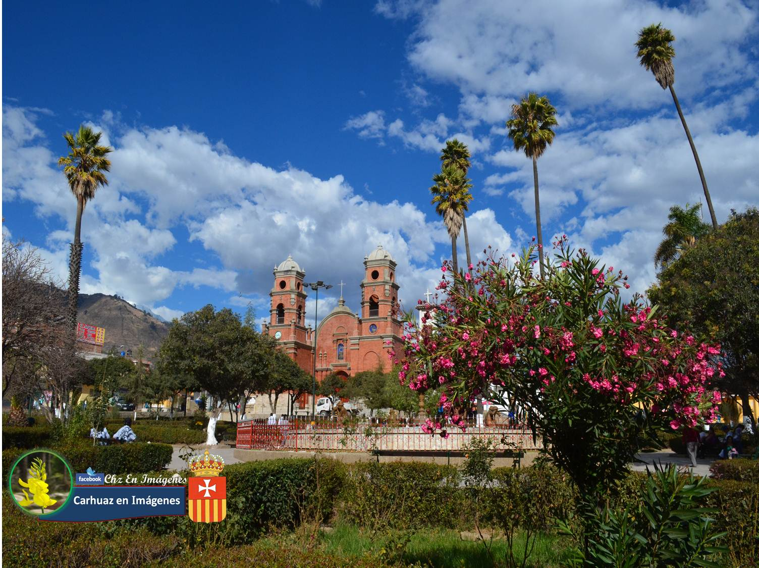 Carhuaz- Ancash- Peru